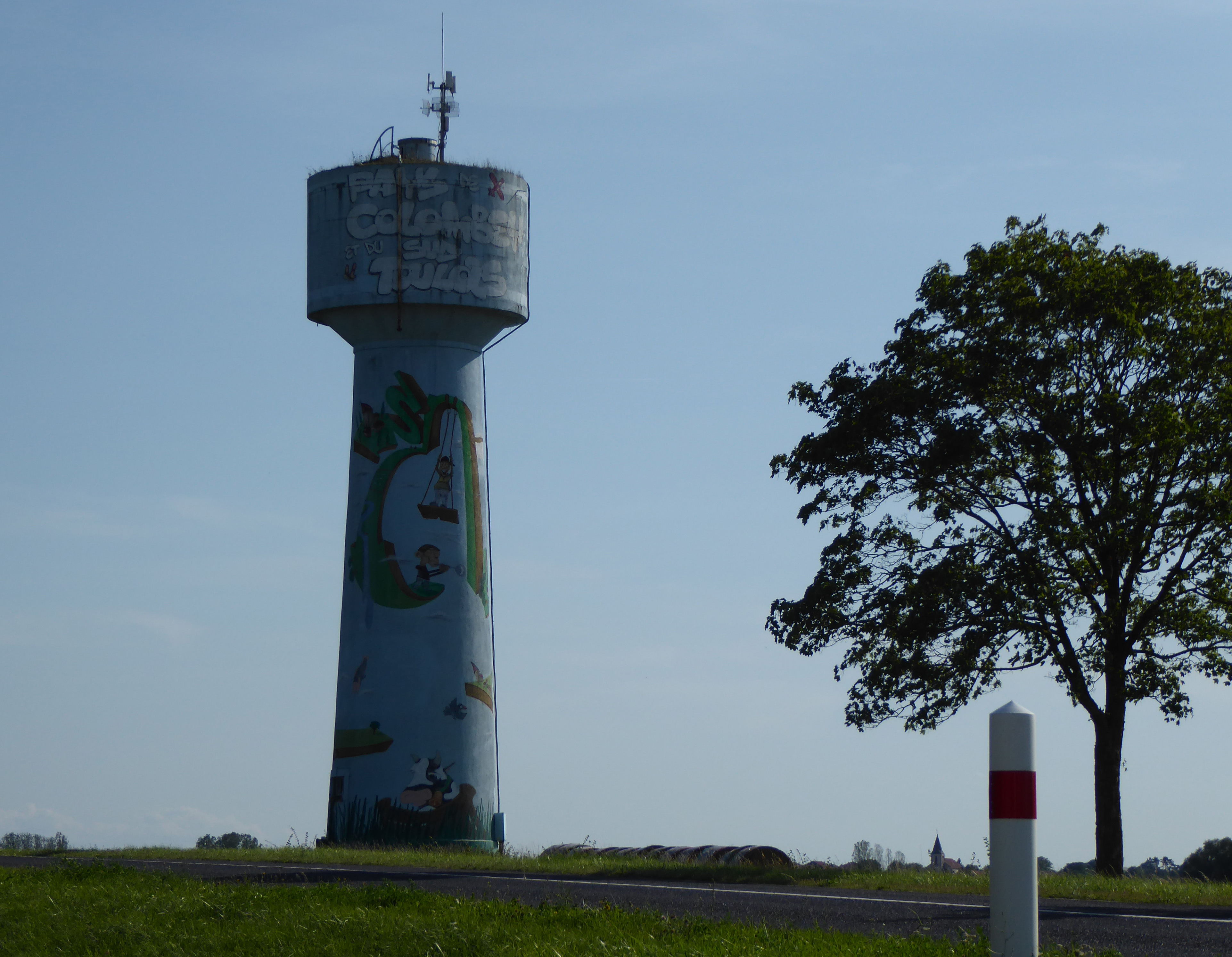 Château d'eau bleu ciel, décoré, près de Moutrot (Meurthe-et-Moselle, France)